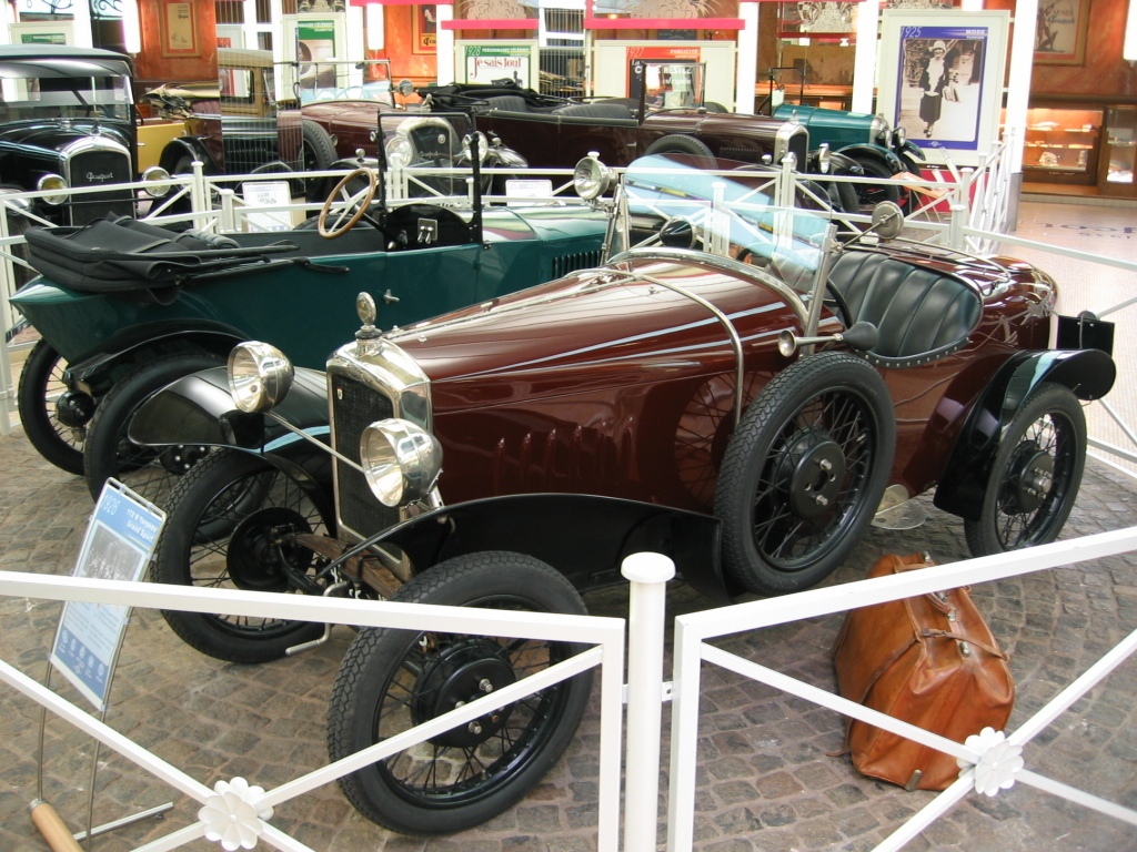 Peugeot Type 172 - Musée Peugeot Sochaux